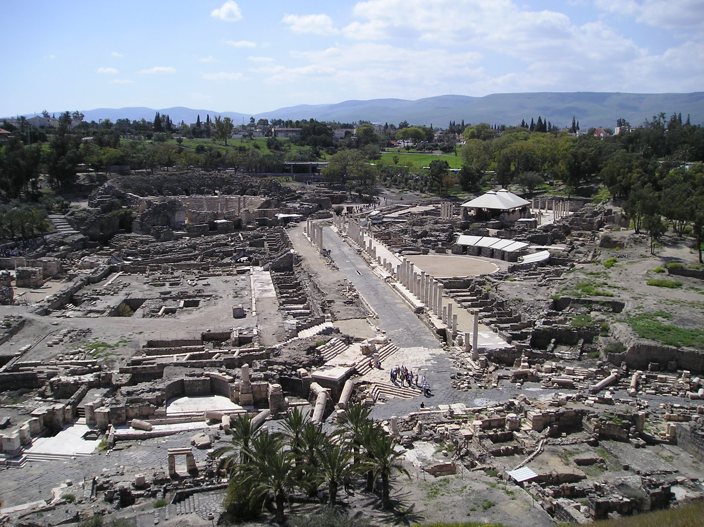 Bet Szean (stanowisko archeologiczne - Scytopolis) w Izraelu. Widok na teren wykopalisk z Tell El-Husn.